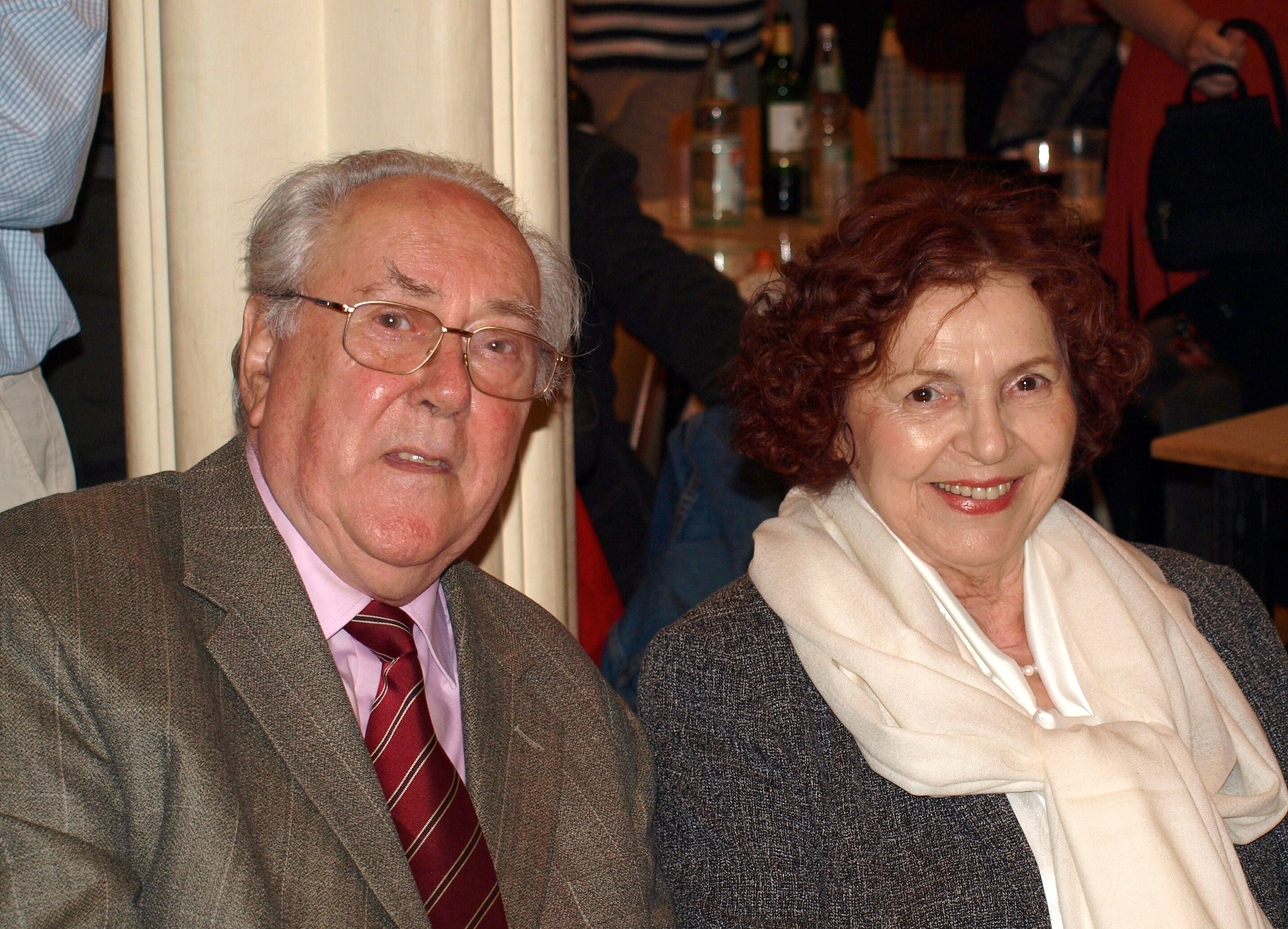 Karlheinz Drechsel mit Frau Annemarie am 22. September 2012 beim Konzert zum 50. Bandjubiläum der Umbrella Jazzmen